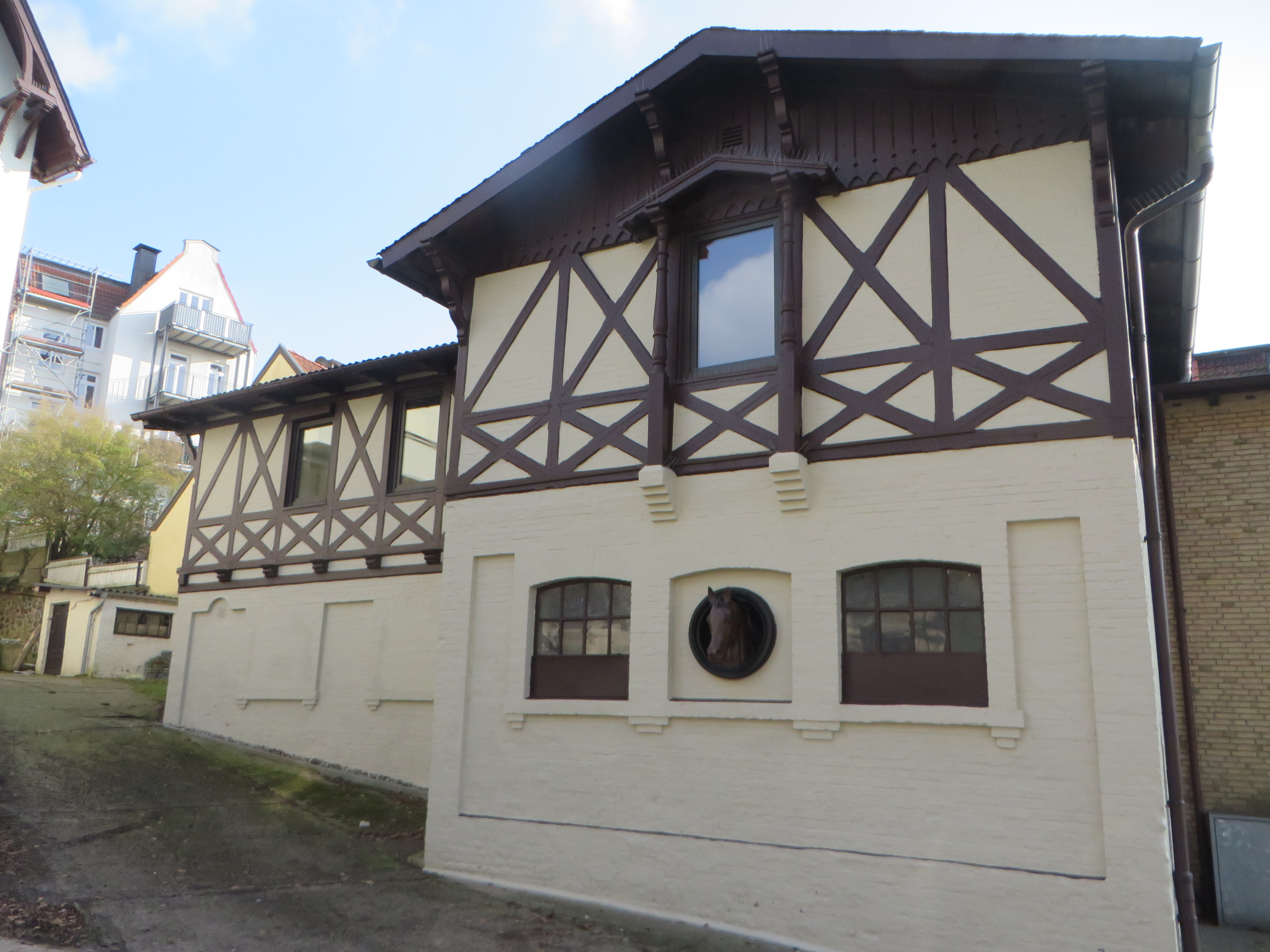 Stallgebäude beim Dienstwohngebäude des Divisionskommandos (Flensburg-Jürgensby 2018), Bild 03